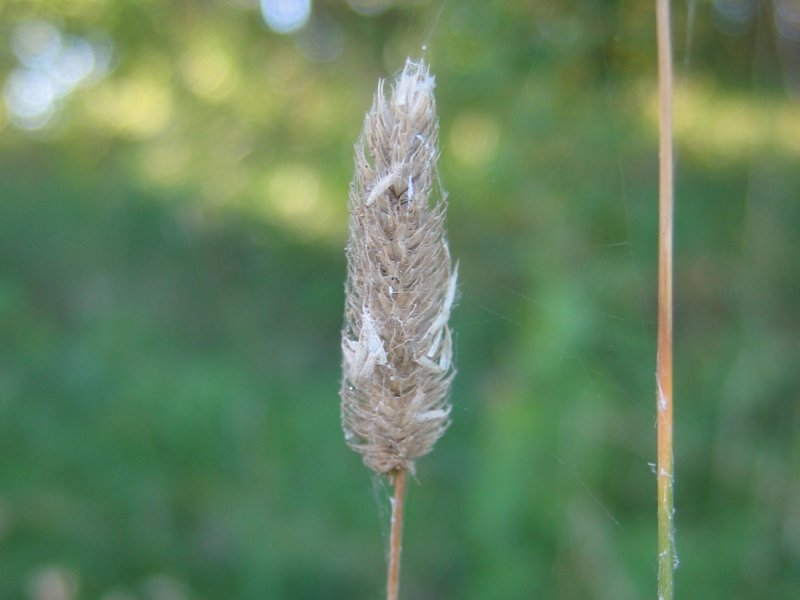 Knolliges Lieschgras (Phleum nodosum)